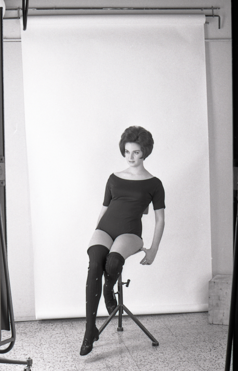 Servizio fotografico : Milano, 1964 / Paolo Monti. - Strisce: 5, Fotogrammi complessivi: 25 : Negativo b/n, gelatina bromuro d'argento/ pellicola ; 35 mm. - ((I fotogrammi hanno una doppia numerazione. - Sul portanegativi: Leica Elmar 65mm. - Sul dorso del portanegativi Monti specifica: "Sala posa Senigaglia". - Nel 1965 Erika Jorger partecipò come Miss Italia a Miss Mondo. - Fonte: Agenda di Paolo Monti: Foto Leica 2 / 111 - 285 (1934-1965), presso Archivio Paolo Monti